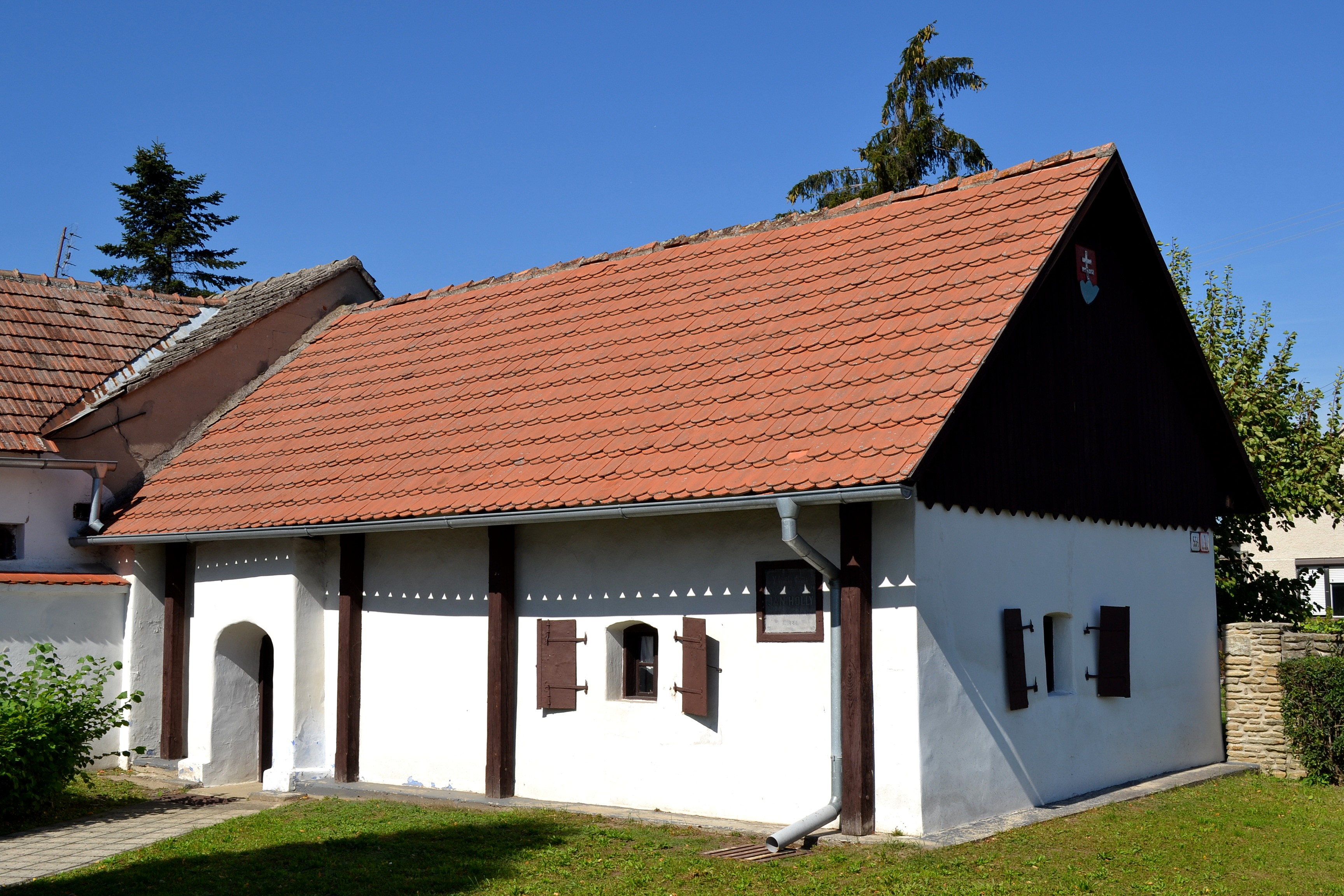 Borský Mikuláš (okr. Senica), rodný dom básnika Jána Hollého; obytný dom